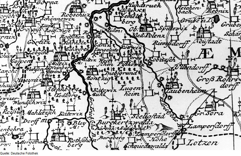 Original image description from the Deutsche Fotothek Triebischtal-Taubenheim. Karte des Amtes Meißen, von Schenk, 1750 (Sign.: VII 104)